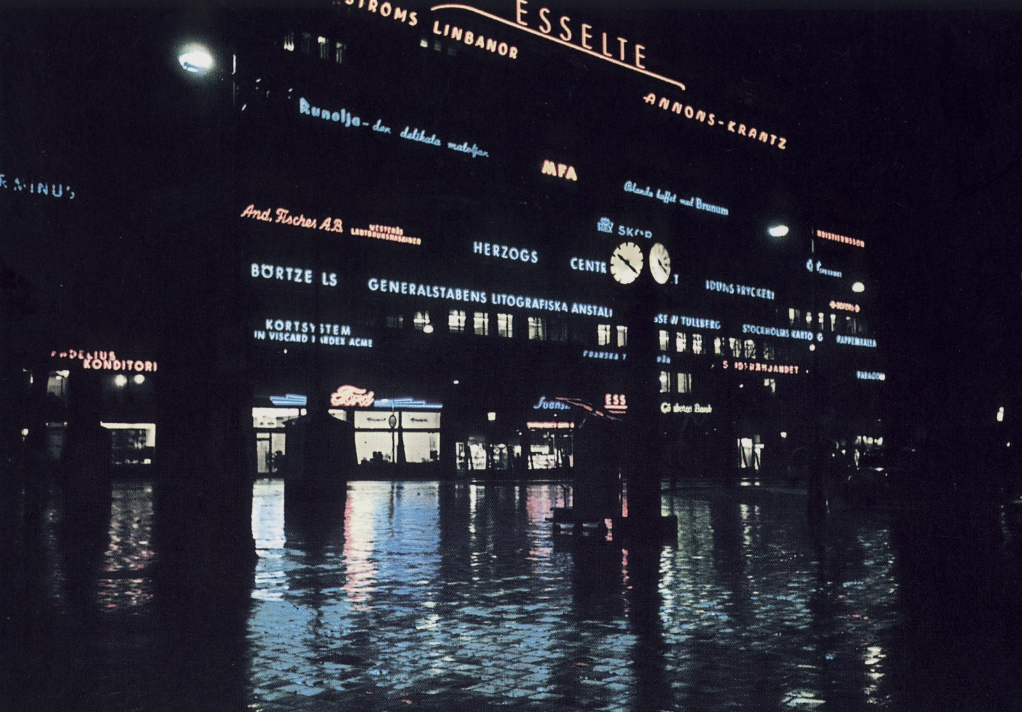 Esselte-huset på Norrmalm i Stockholm 1945